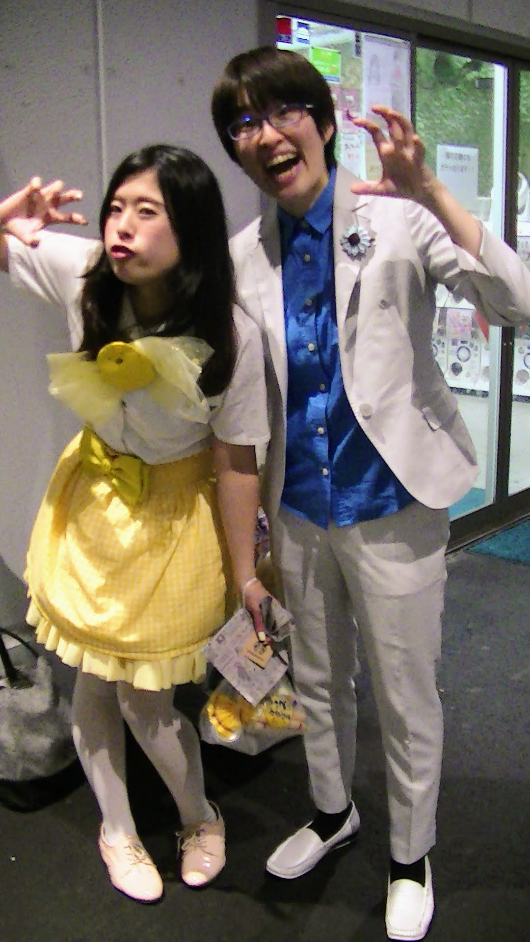 HENHEN事変 (2017年10月)